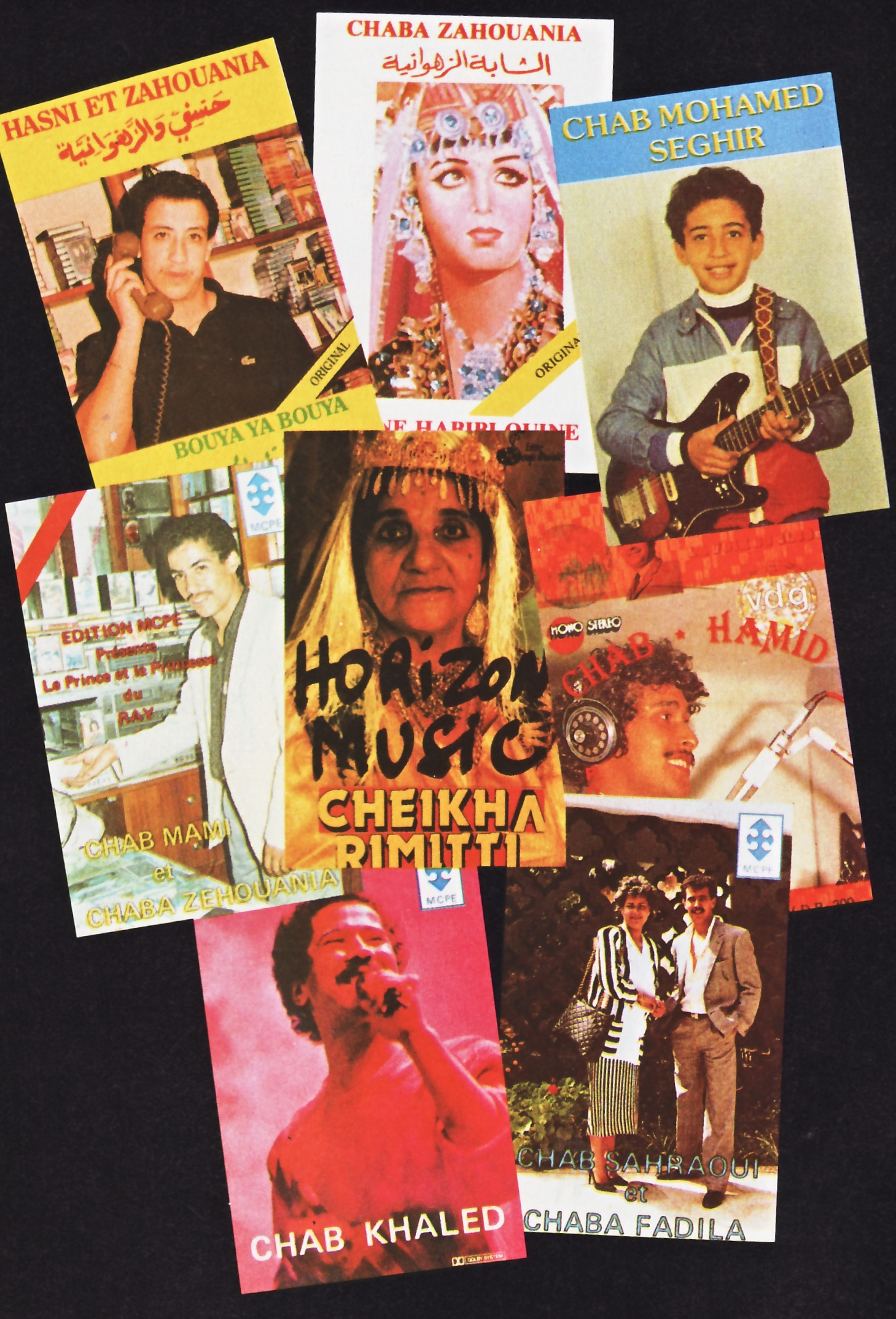 Jaquettes des cassettes des chanteurs de raï 1985 : Cheb Hasni, Chaba Zahouania, Cheb Mohamed Seghir, Cheb Mami, Chikha Rimiti, Cheb Hamid, Cheb khaled et Chaba Fadéla avec Sahraoui